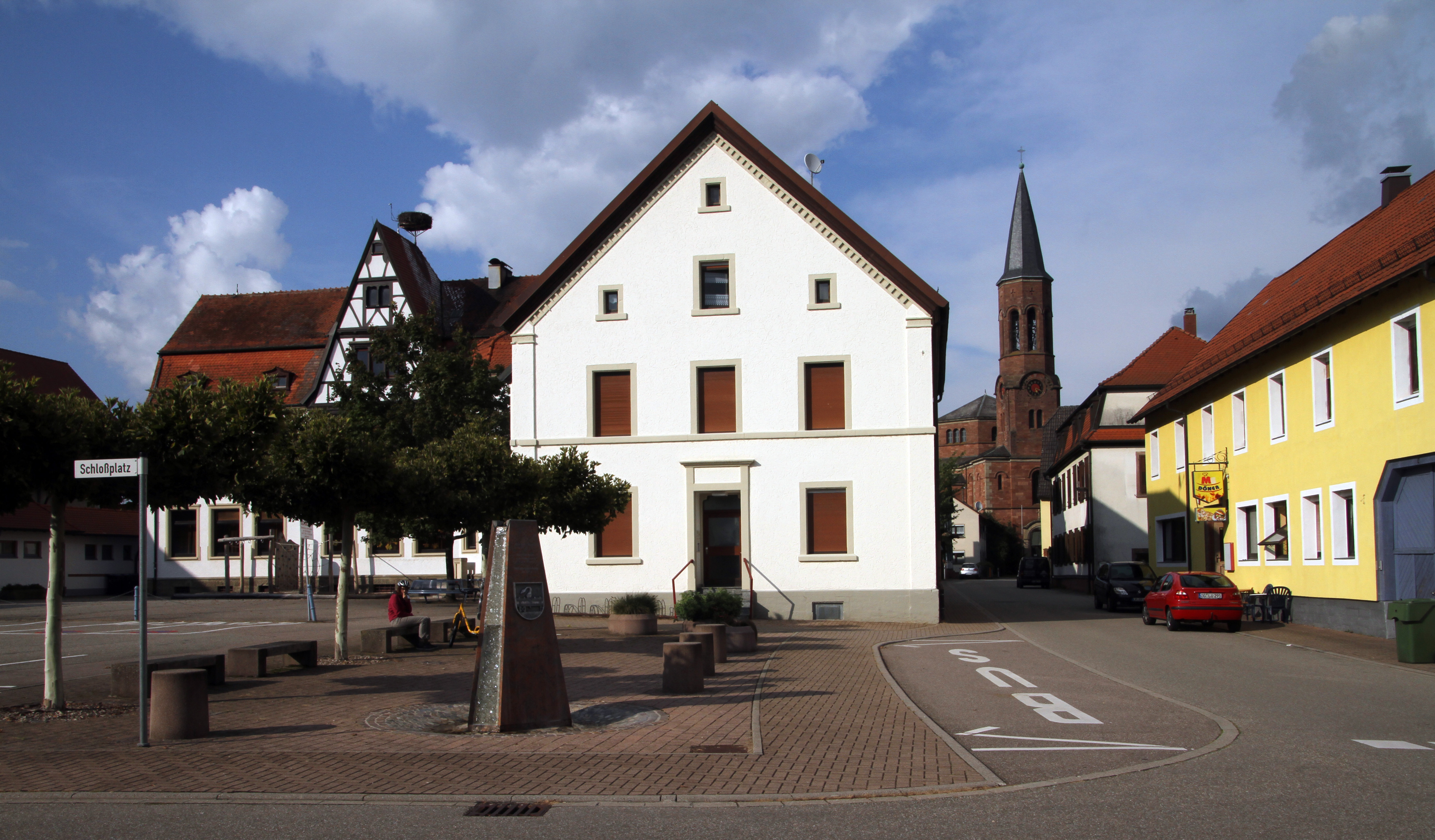 Rheinbischofsheim